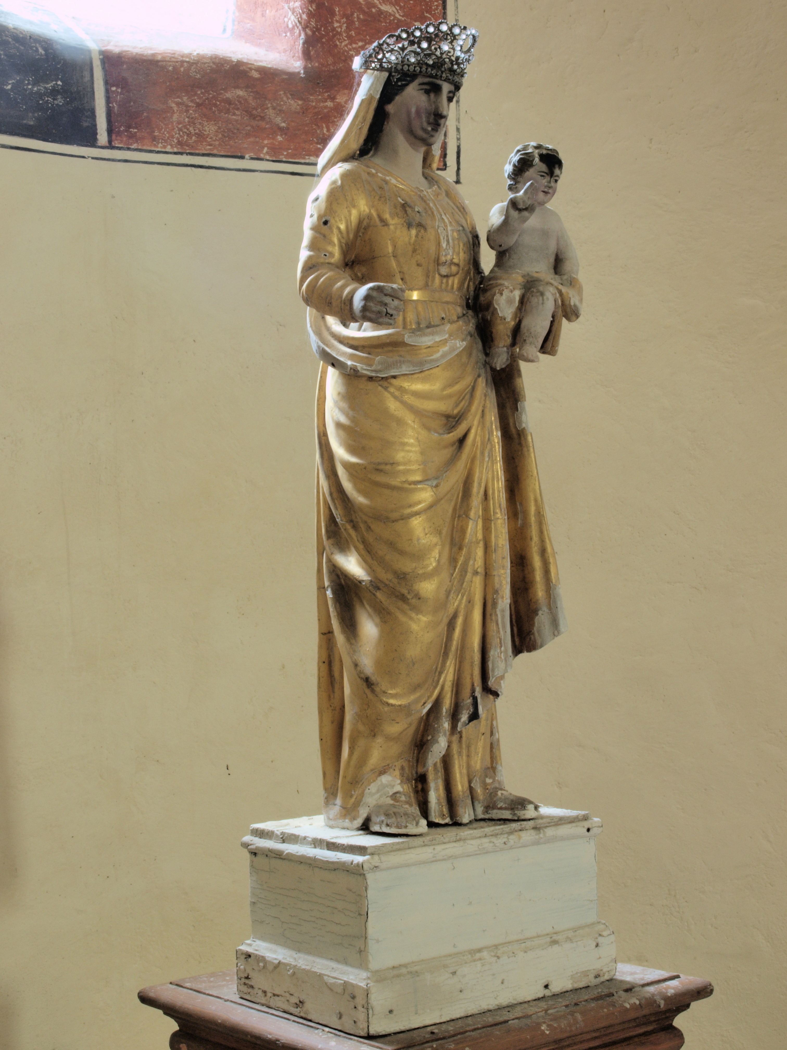 Église Saint-Aignan de Bègues (Allier, France) ; intérieur